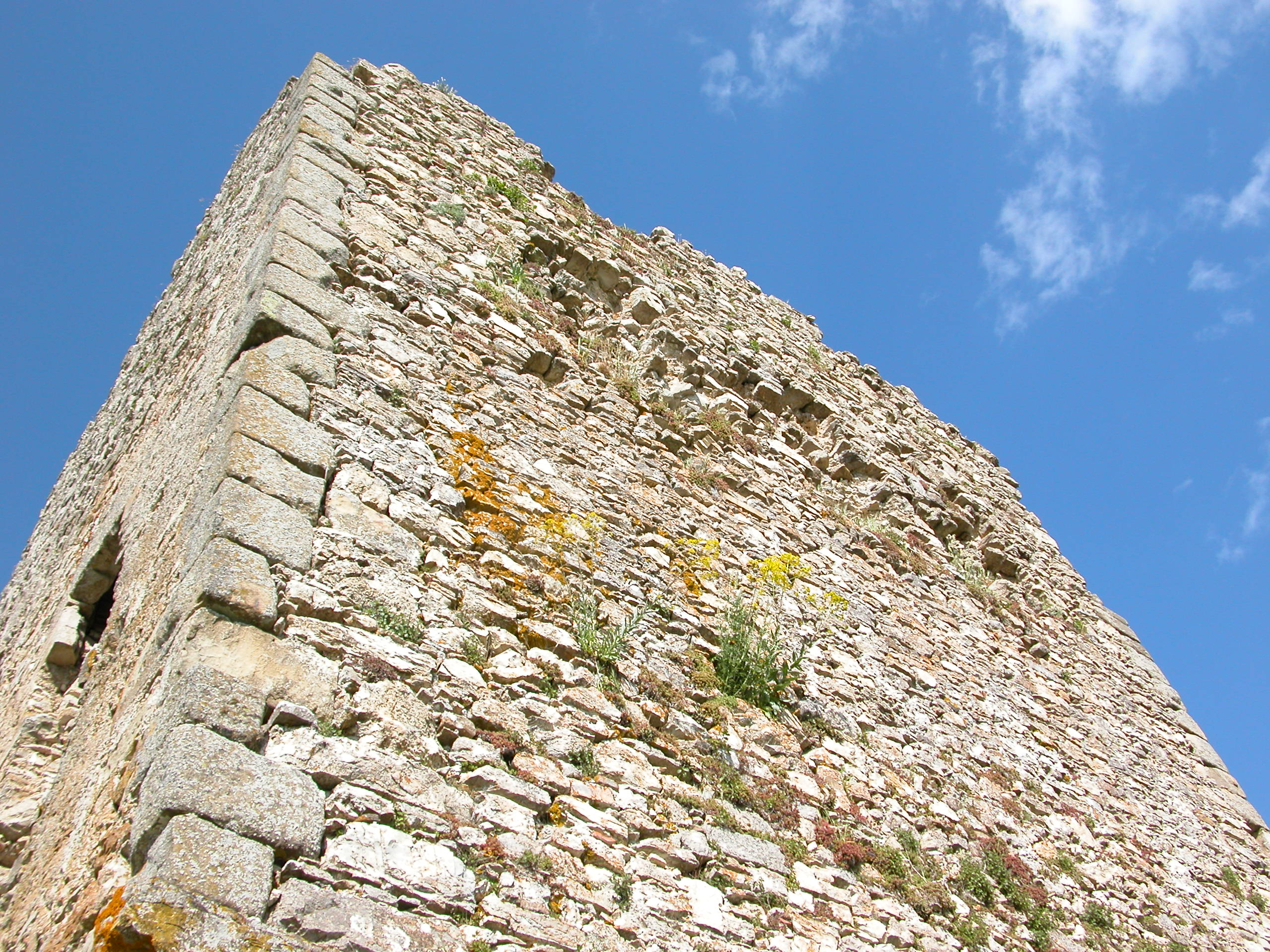 Dettaglio della Torre di Satriano